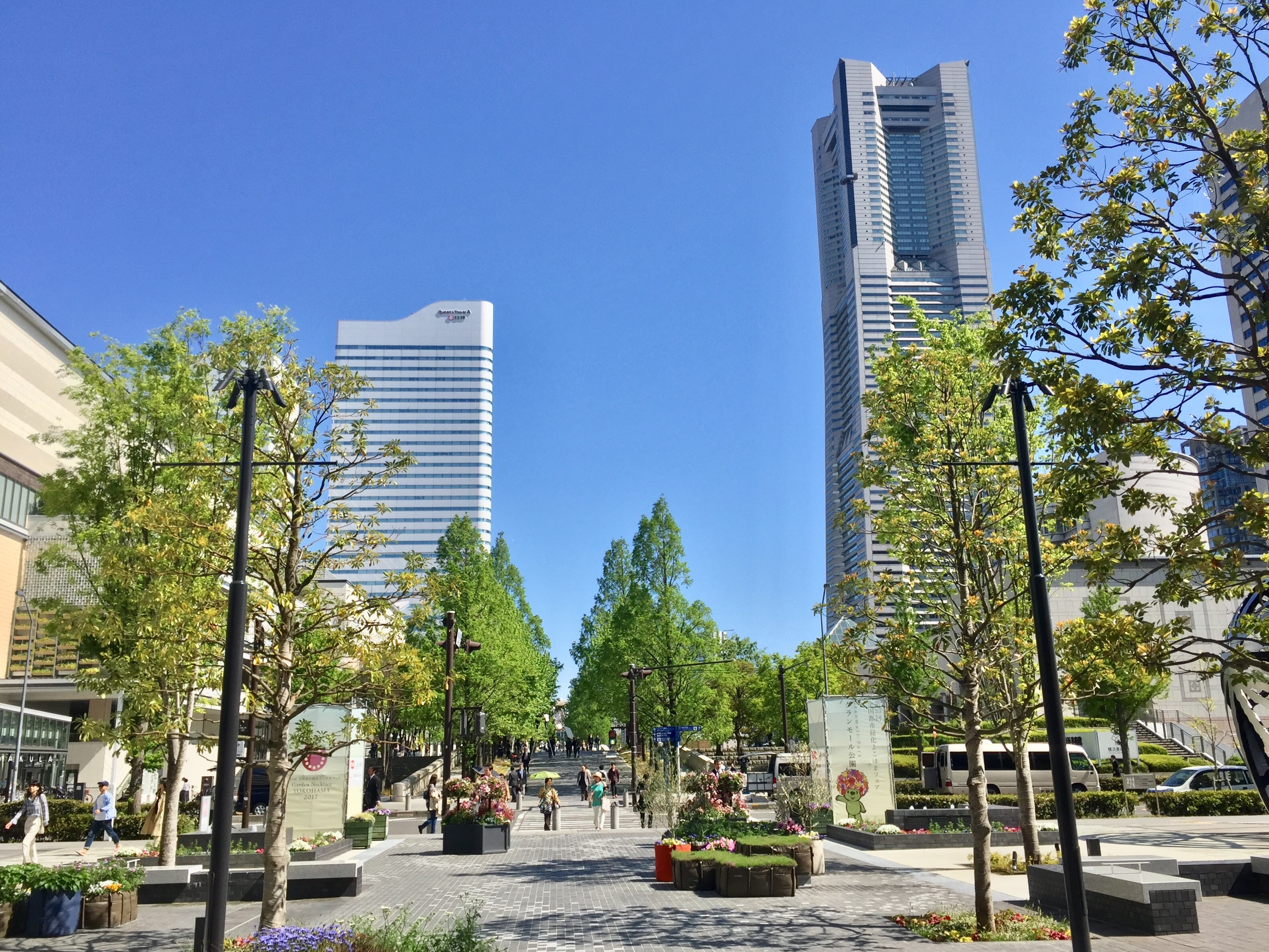 グランモール公園の「桟橋の広場」（グランドセントラルタワー付近）にてランドマークタワーとクイーンズスクエアのスカイラインを望む。この付近では2016年から2017年にかけて再整備が行われている。 ※第33回全国都市緑化よこはまフェア開催中。